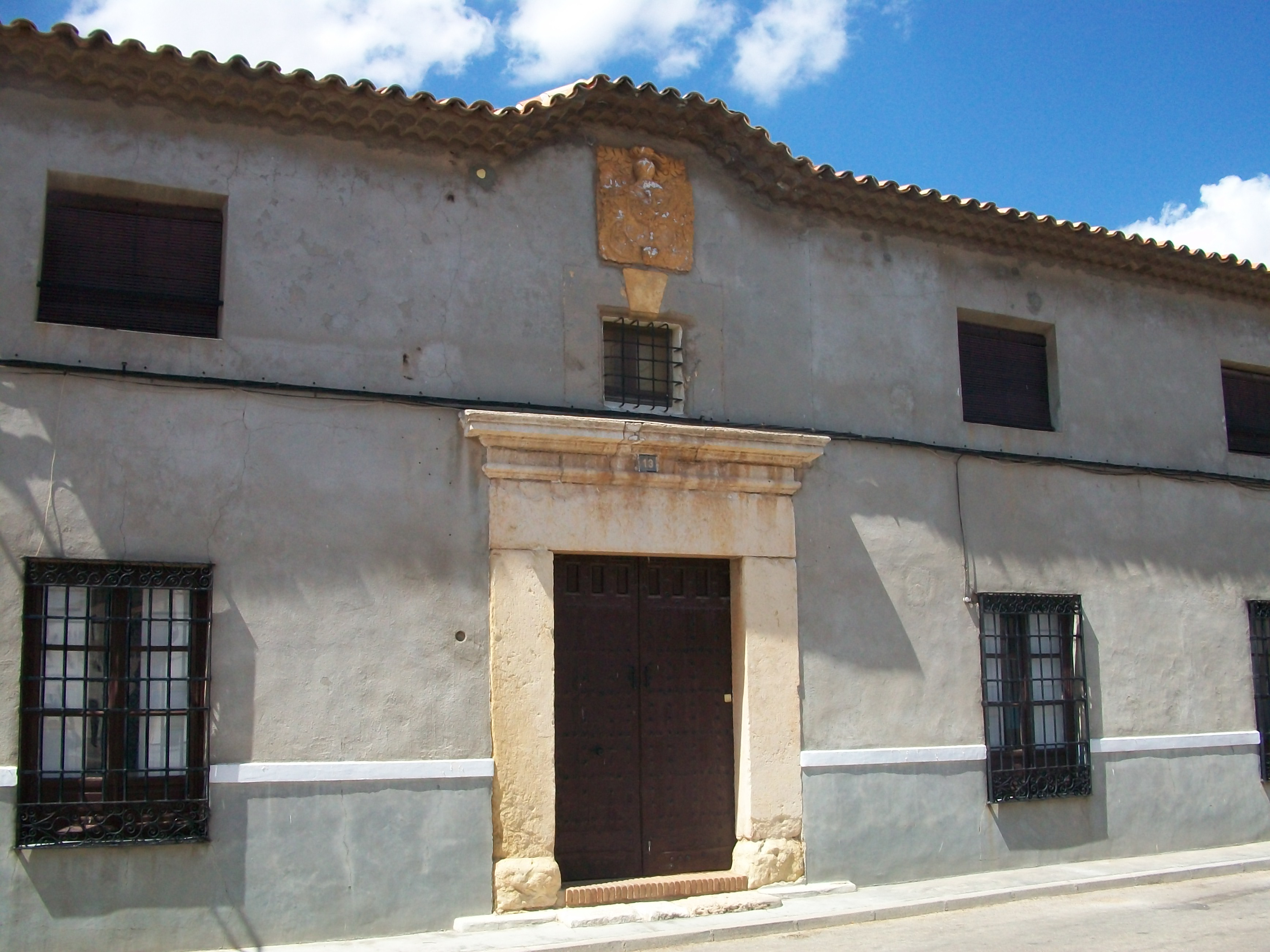 Casa de los Fernández Cuéllar en Pedro Muñoz.